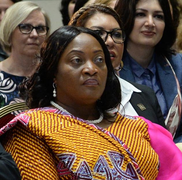 ראובן ריבלין נשיא מדינת ישראל ורעייתו נחמה ריבלין אירחו את כנס נשים מנהיגות ה-30 שמאורגן על ידי מש"ב - המרכז לשיתוף פעולה בינלאומי של משרד החוץ של ישראל. שנייה משמאל ג'ואל טיילור סגנית נשיא ליבריה